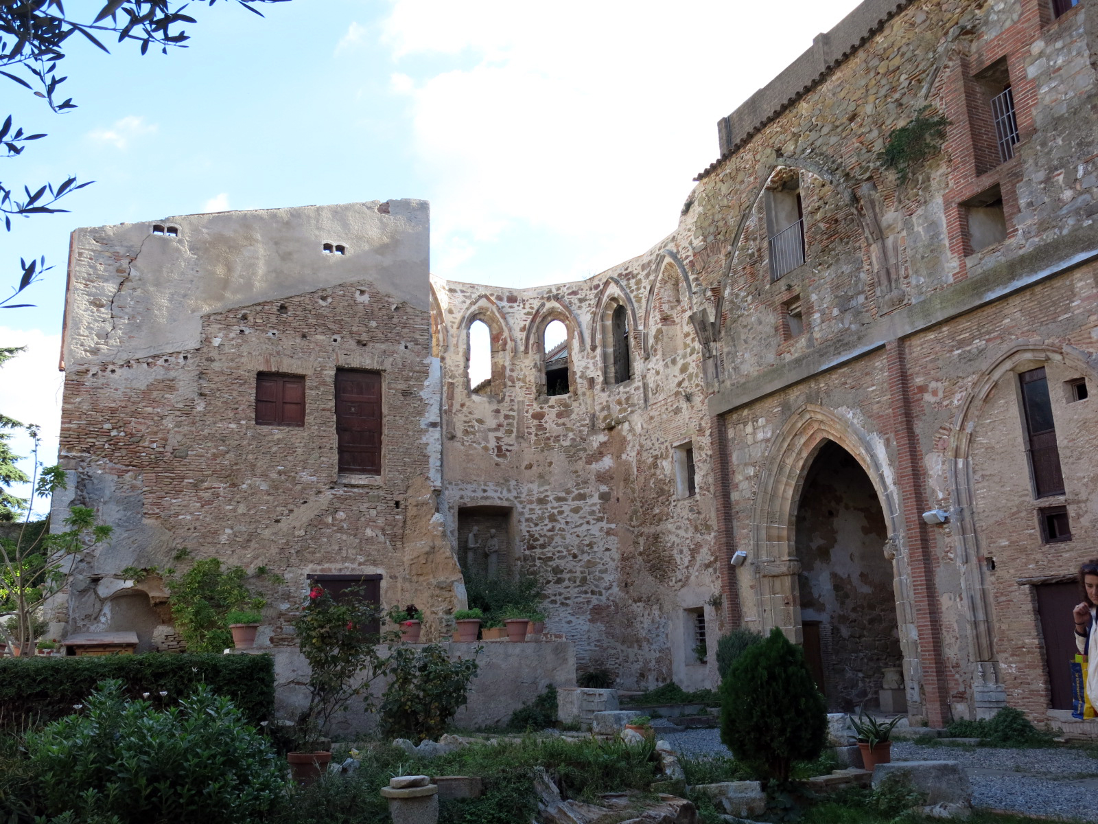 Monestir de Sant Jeroni de la Murtra (Badalona)